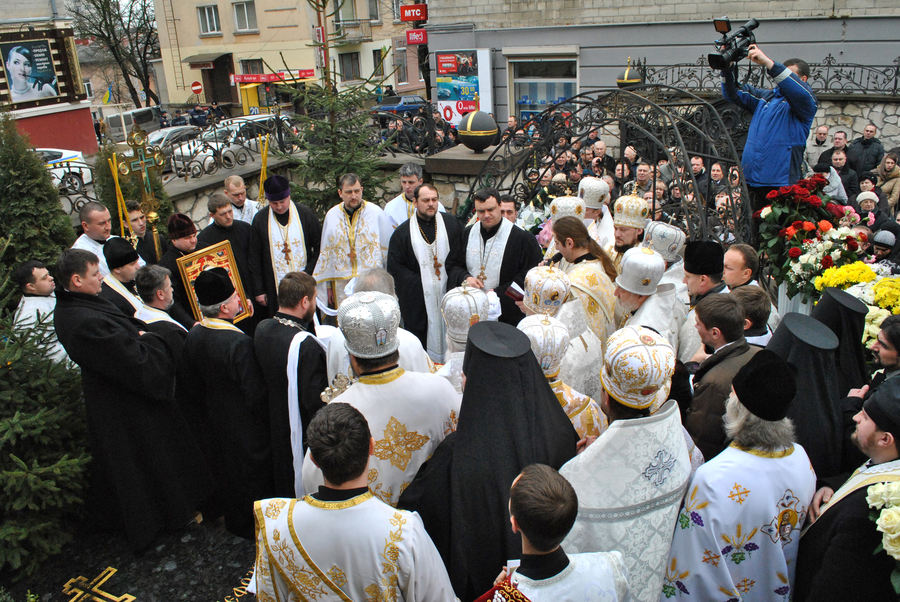 Похорон предстоятеля Української автокефальної православної церкви, Митрополита Київського і всієї України Мефодія в церкві Різдва Христового (м. Тернопіль).